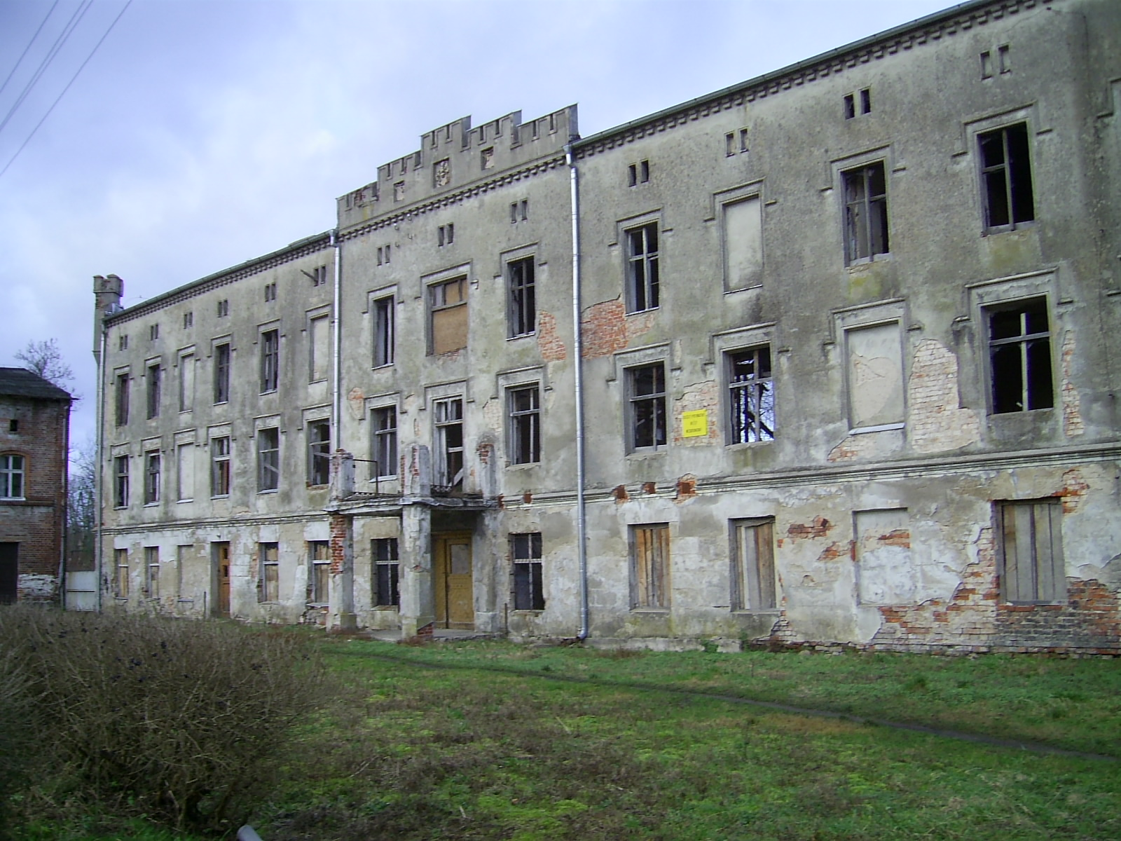 Kozia Góra, pałac od frontu, autor zdjęcia Uczeń, 14.01.2007 r.